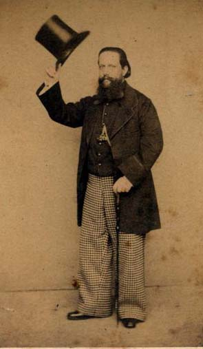 Luis Carlos de Borbón-Dos Sicilias (1824-1897)